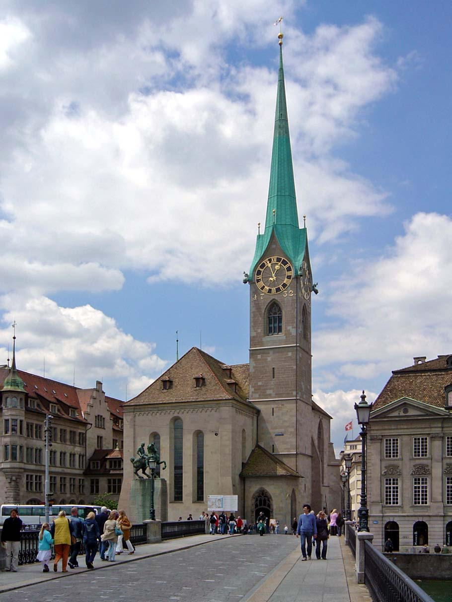 Die Fraumünsterkirche in Zürich von der Münsterbrücke aus gesehen